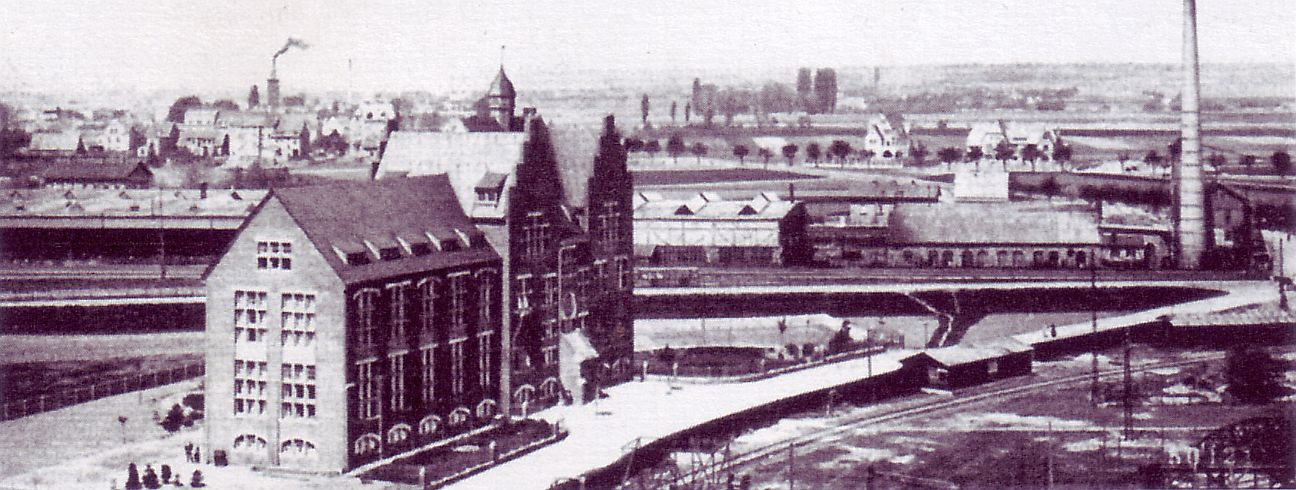 Verwaltungsgebäude MAN Werk Gustavsburg 1890